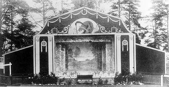 Teaterscenen i Södra Folkparken vid slutet av 1910-talet